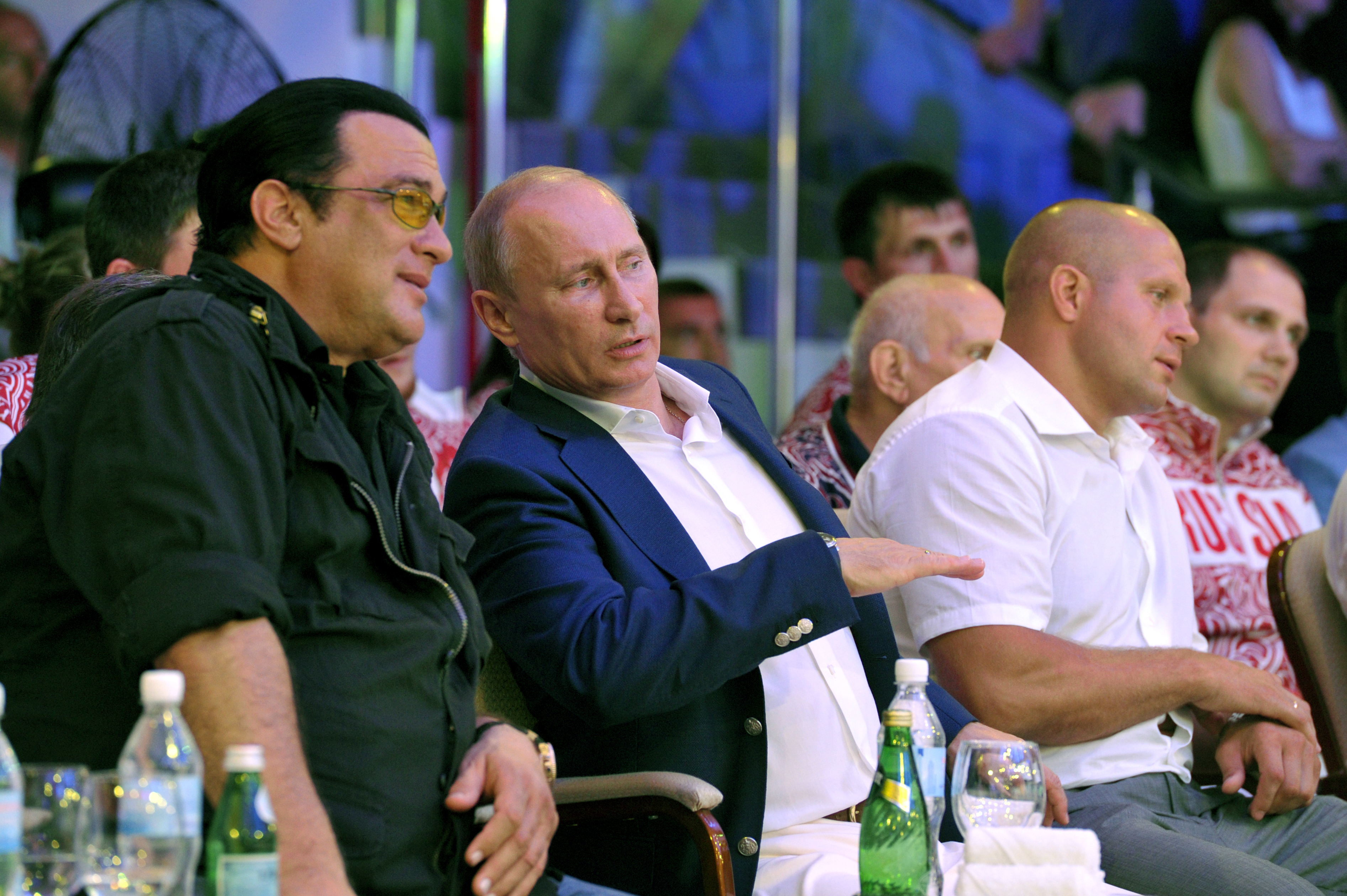 Актёр Стивен Сигал, Владимир Путин и многократный чемпион мира по смешанным единоборствам Фёдор Емельяненко